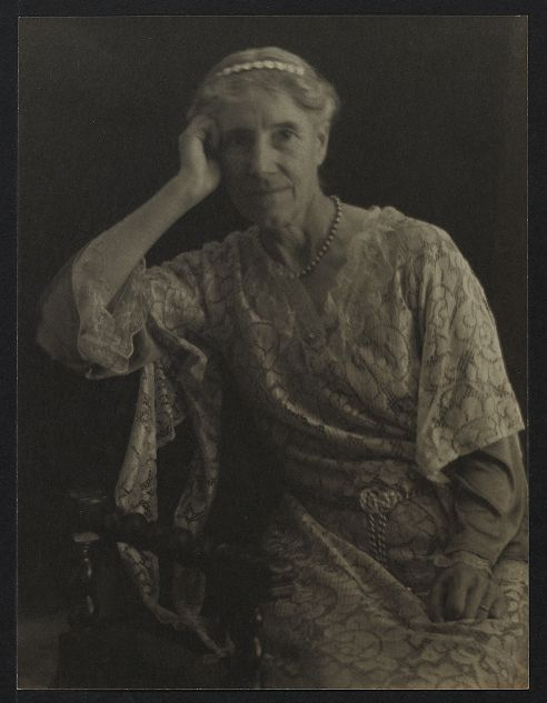 Last years Charlotte Perkins Gilman